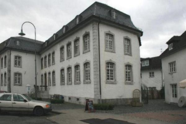 Haus Basten, Konrad-Adenauer-Straße 118, Denkmal Nr. 15 in Geilenkirchen